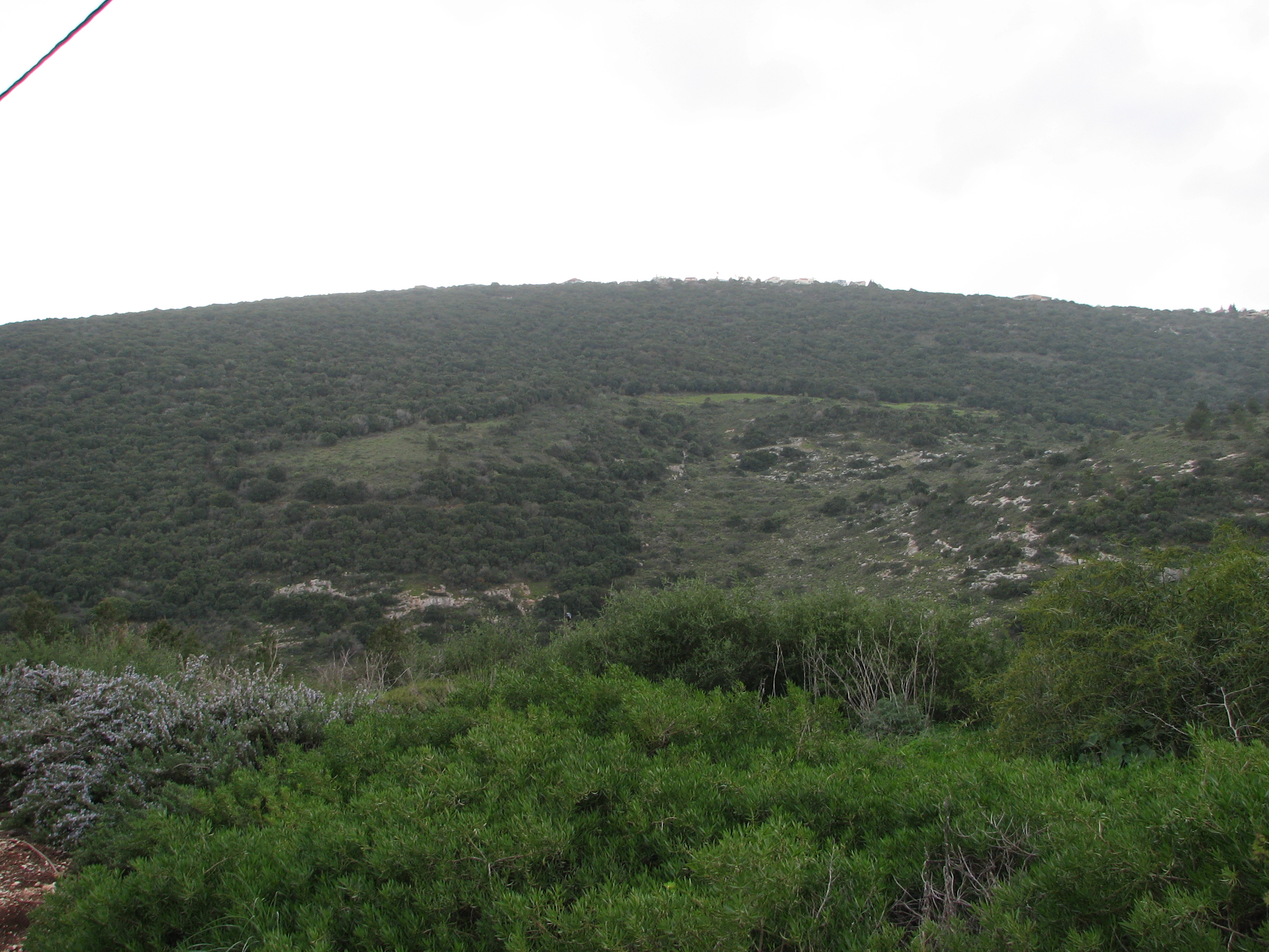 הר שכניה הוא הר במערב הגליל התחתון, שיא גובהו הוא 456 מטרים מעל פני הים ביישוב קורנית. מבט מכיוון צפון מהיישוב רקפת